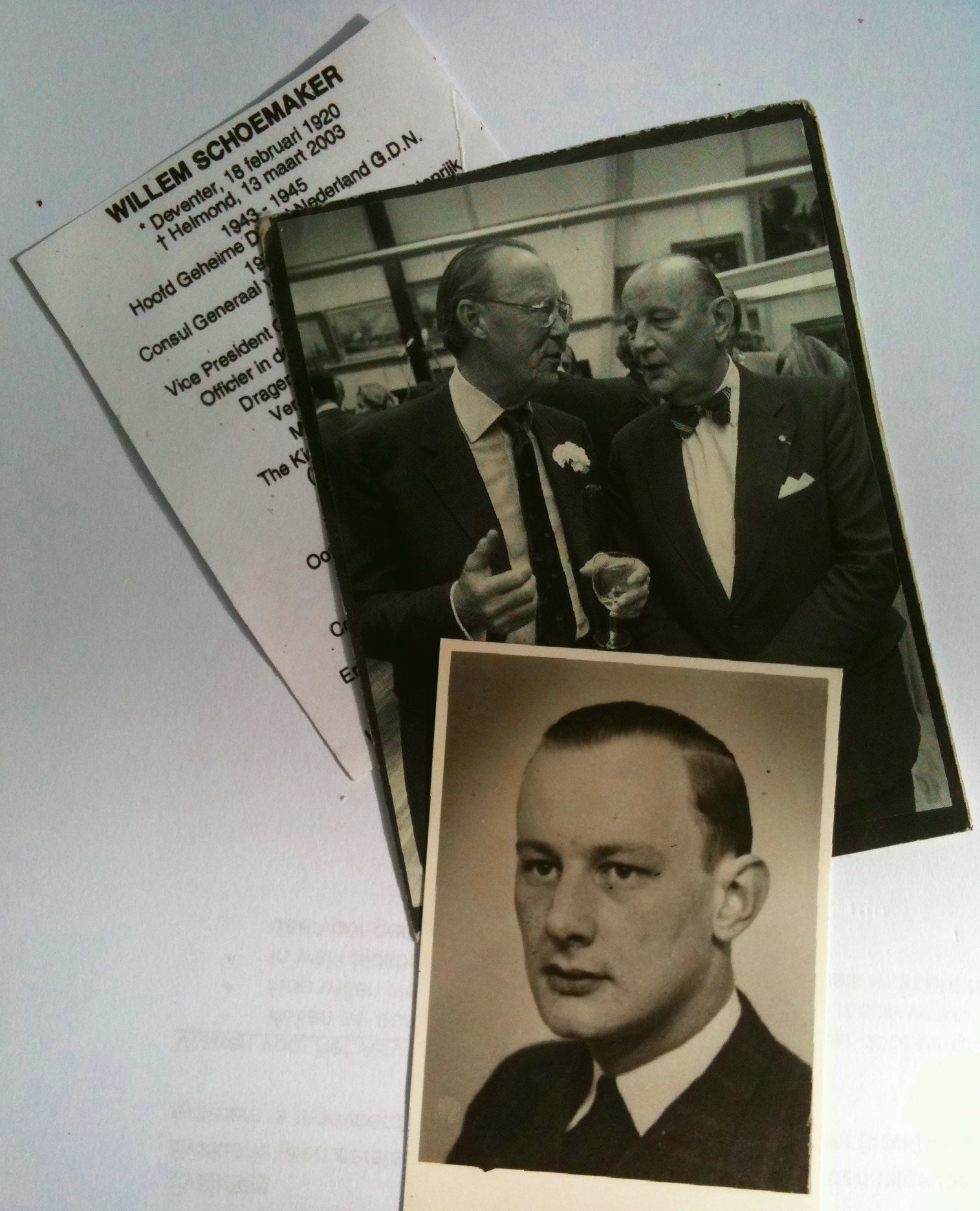 Collage van Willem Schoemaker.